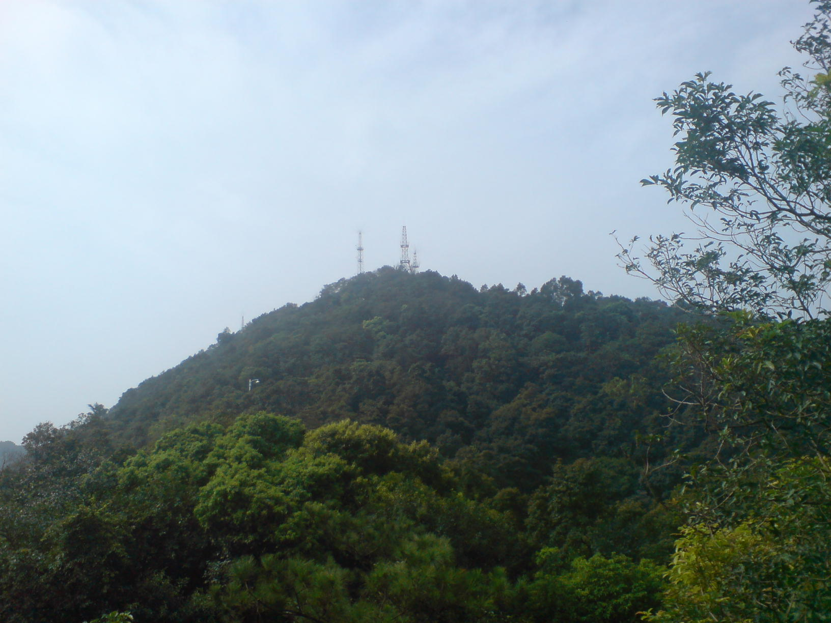 广州帽峰山最高山峰